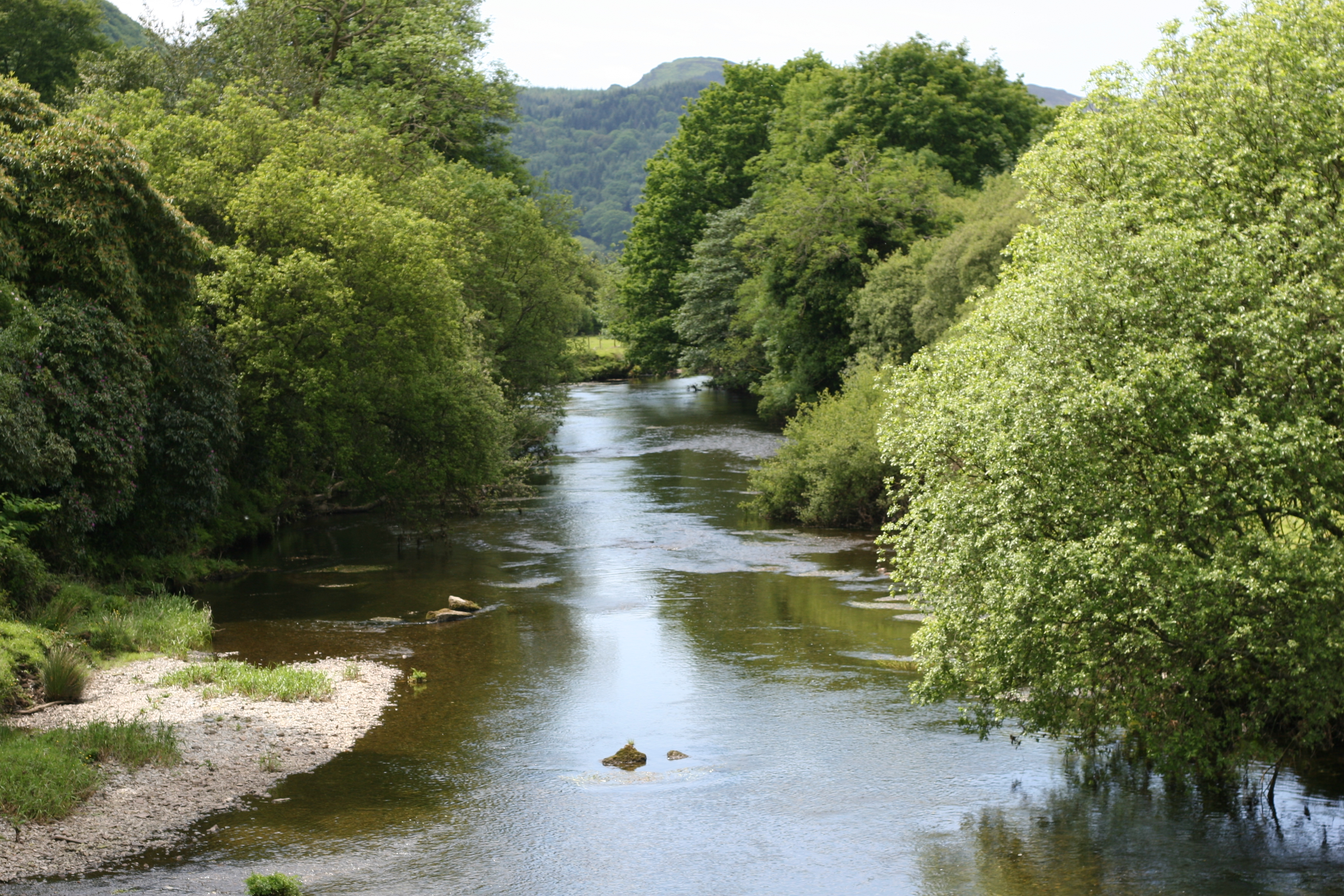 Afon Dwyryd ger Maentwrog River Dwyryd near Maentwrog Rhion Pritchard (own work)